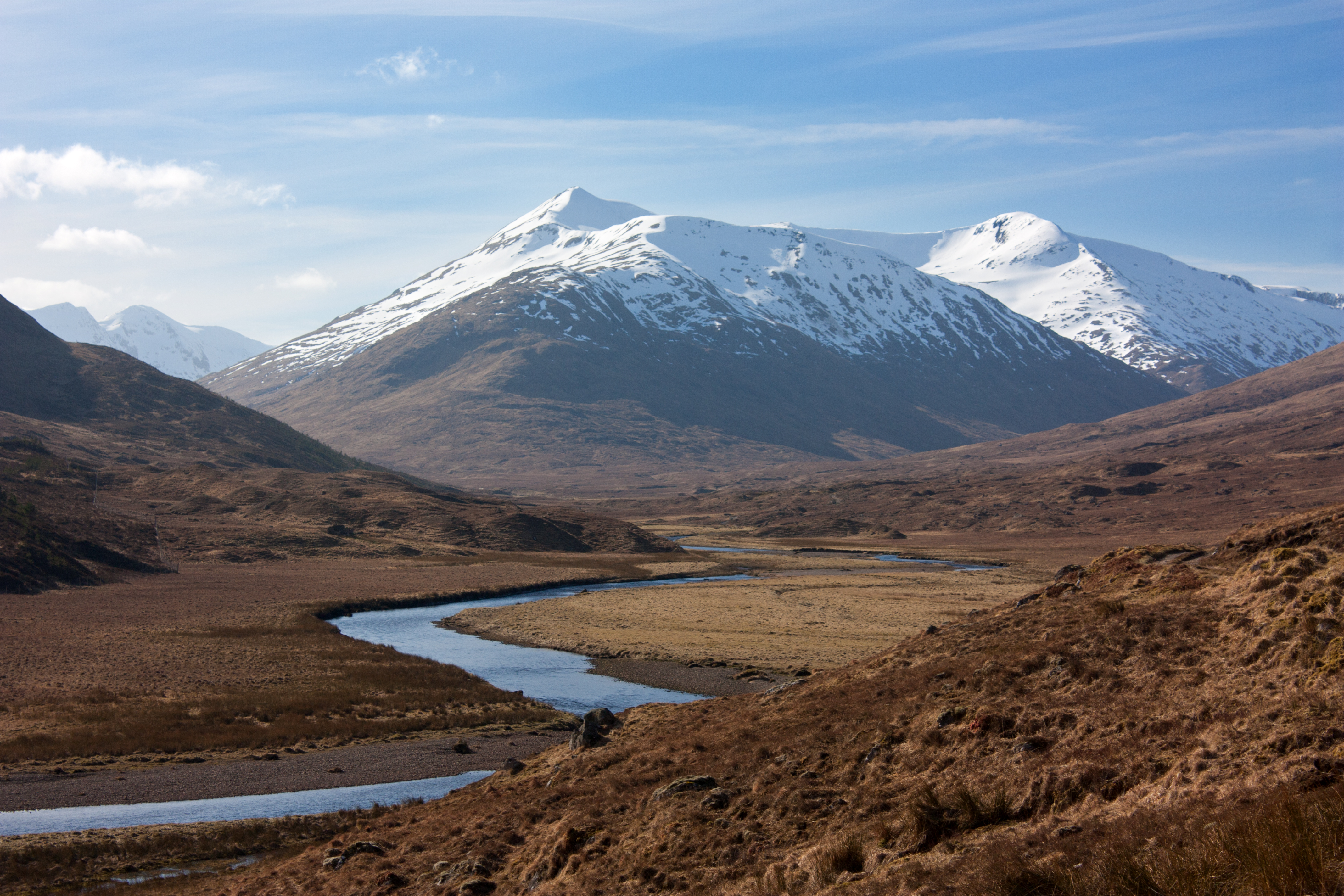 Gàidhlig: Gleann Afraig an Iar agus Beinn Fhada